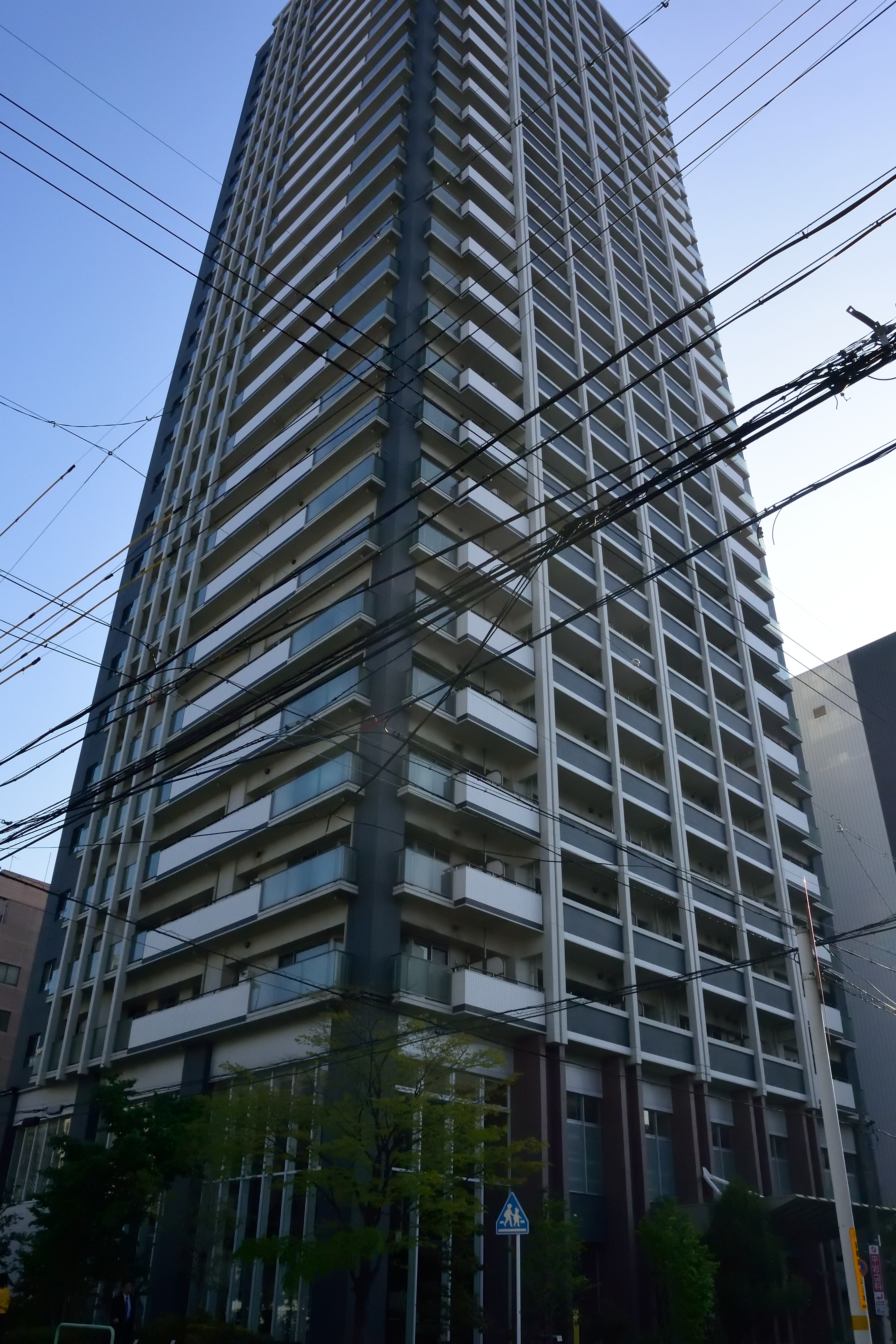 名古屋センタータワー